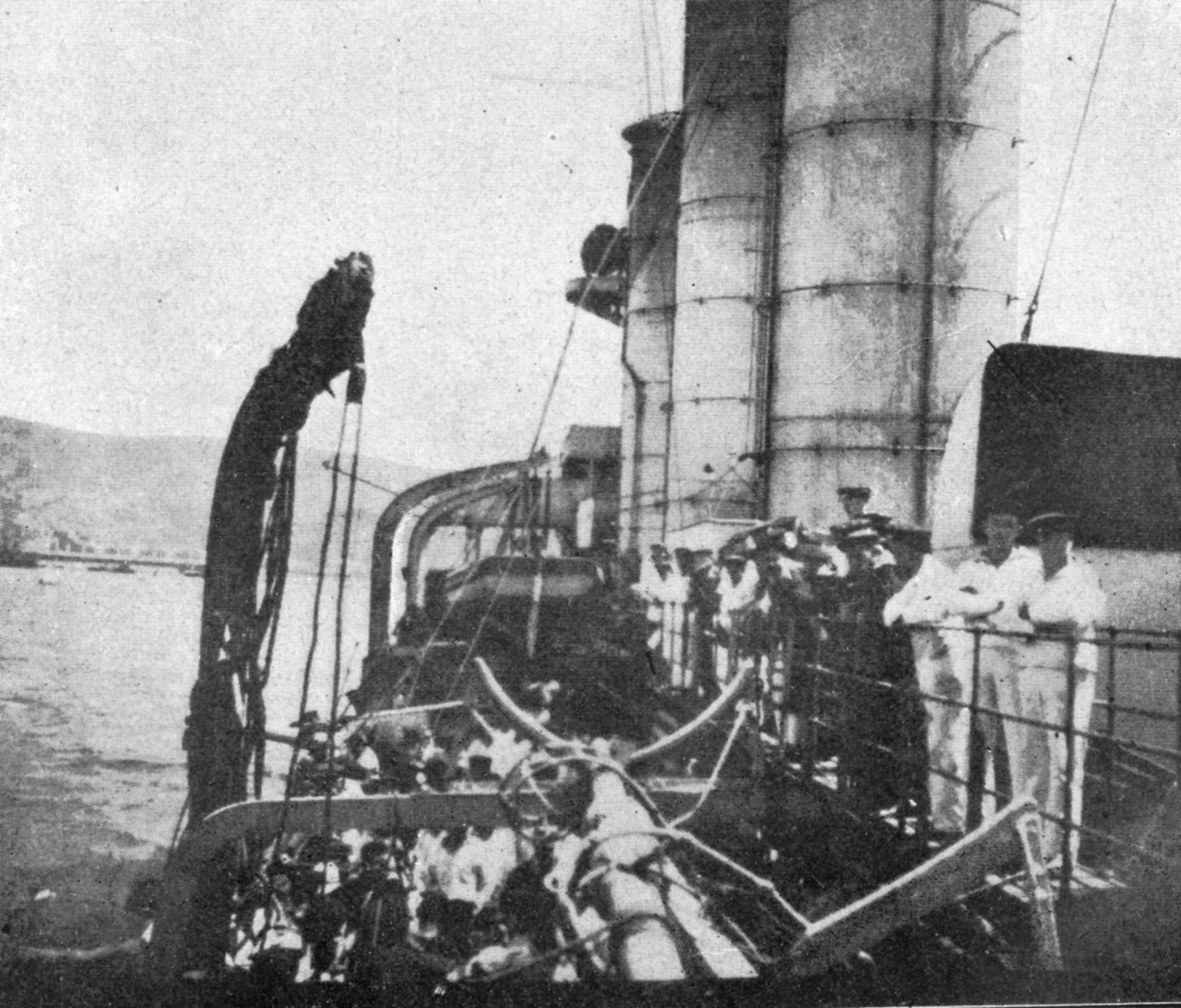 SMS DRESDEN in Valparaiso, Chile, 13. November 1914. Blickrichtung Backbord Richtung Bug